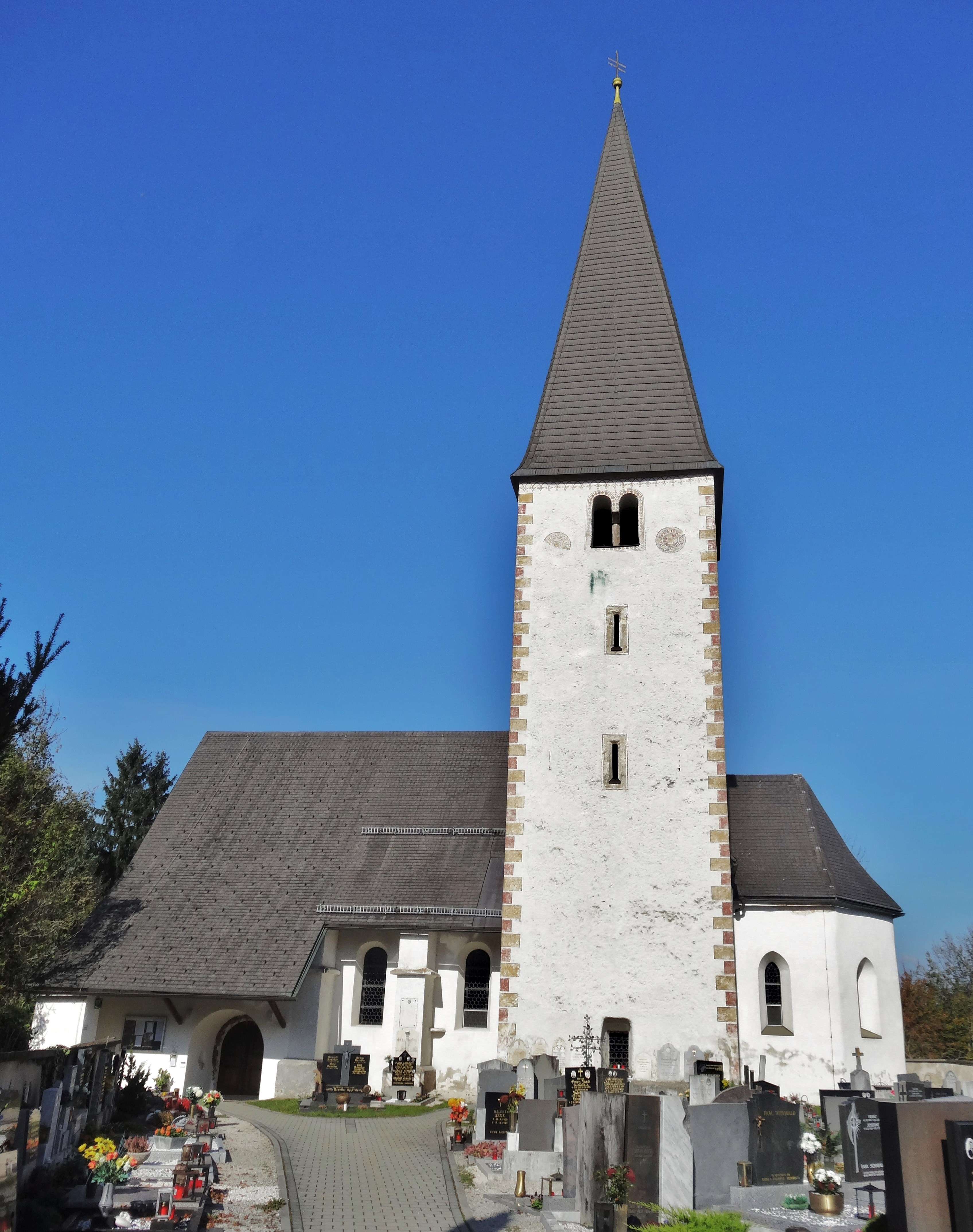 Kath. Pfarrkirche Hl. Jakobus d. Ä. (Gallizien)